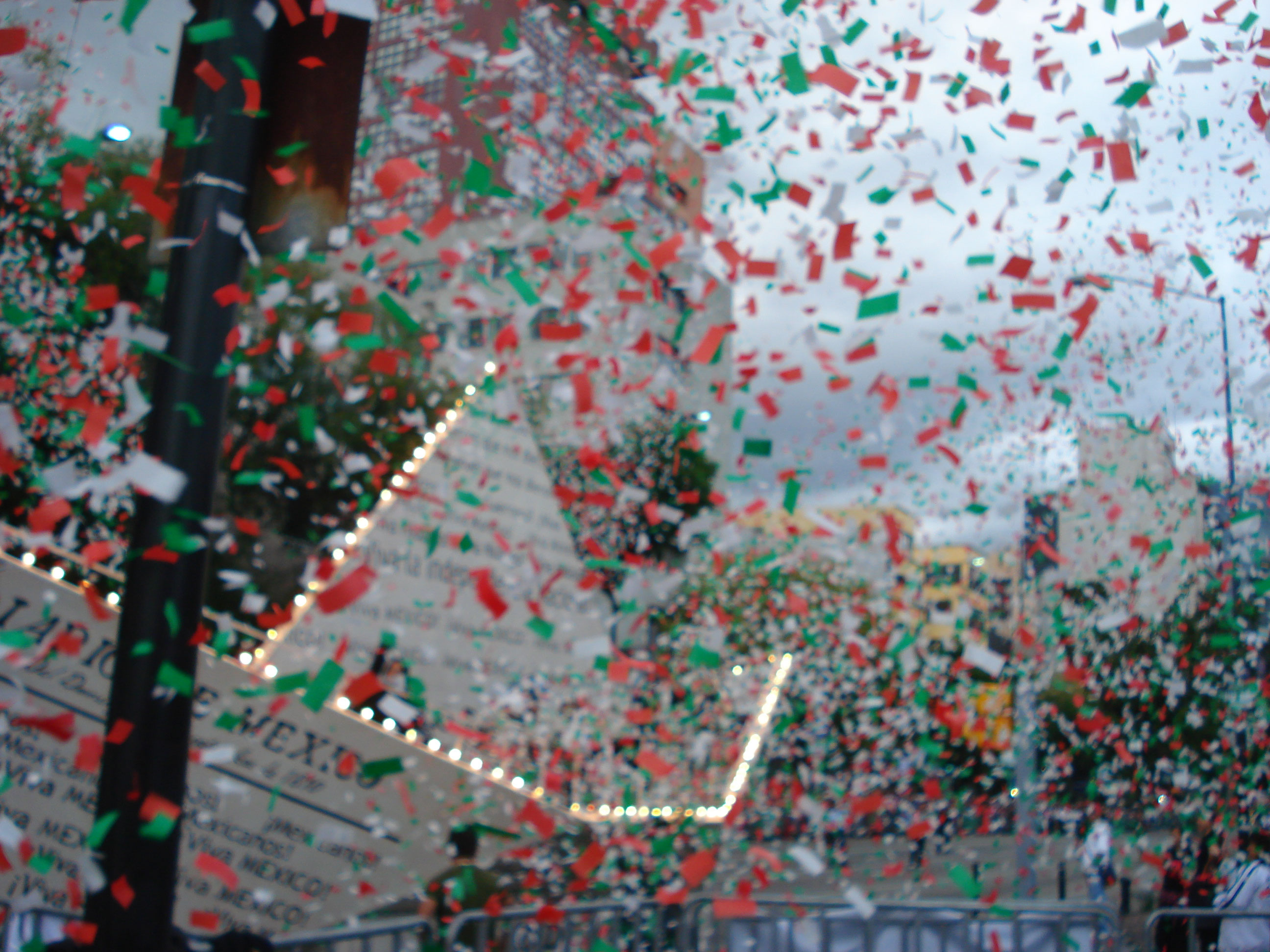 Barco de papel del desfile bicentenario